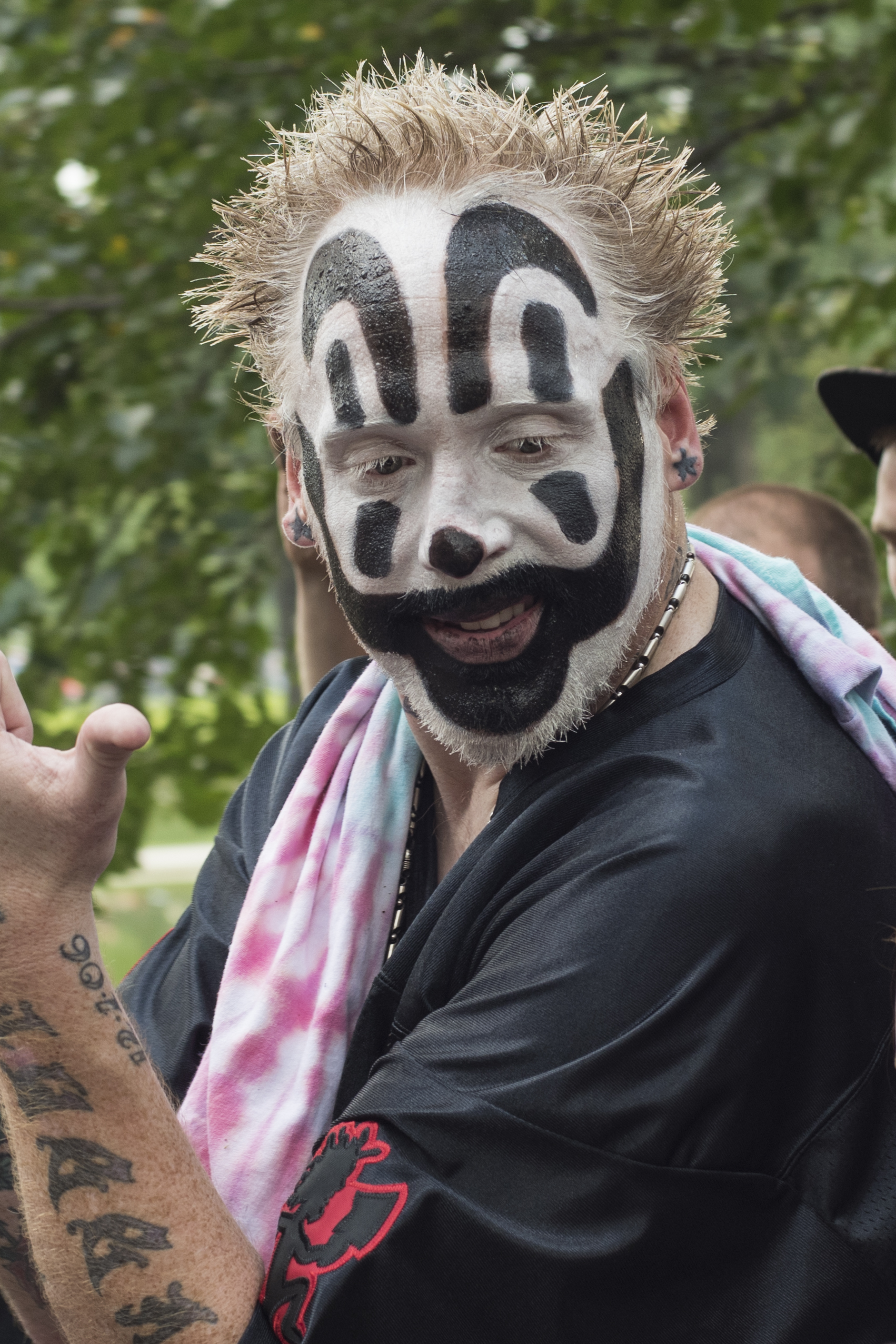 Juggalo March